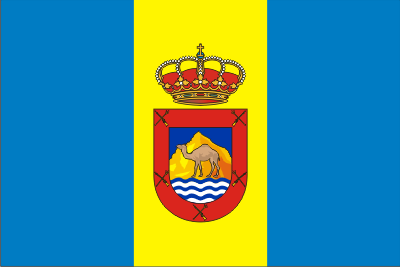 Bandera de Tuineje (Fuerteventura, Las Palmas, España)